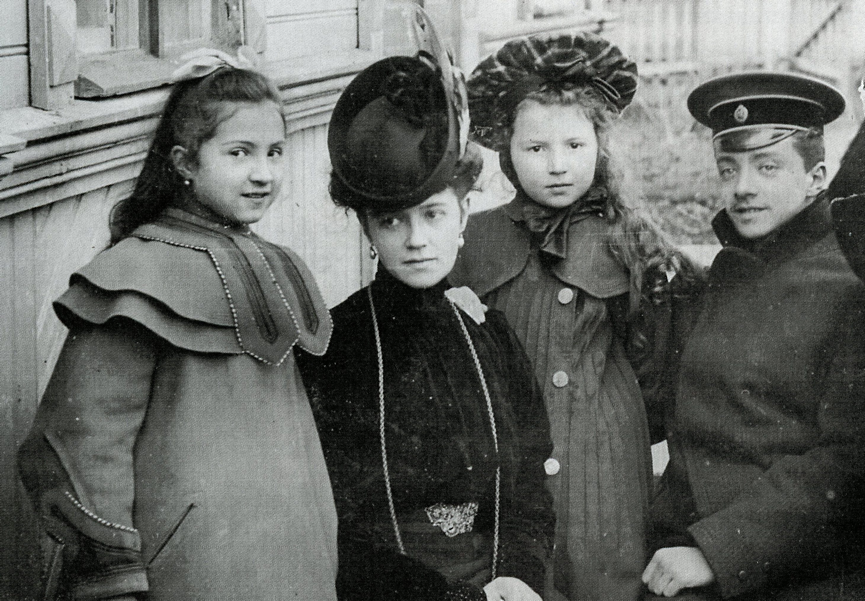 Параскева (слева) и Элизабет (центр) Сайн-Витгенштейн-Берлебург с родственниками в Санкт-Петербурге